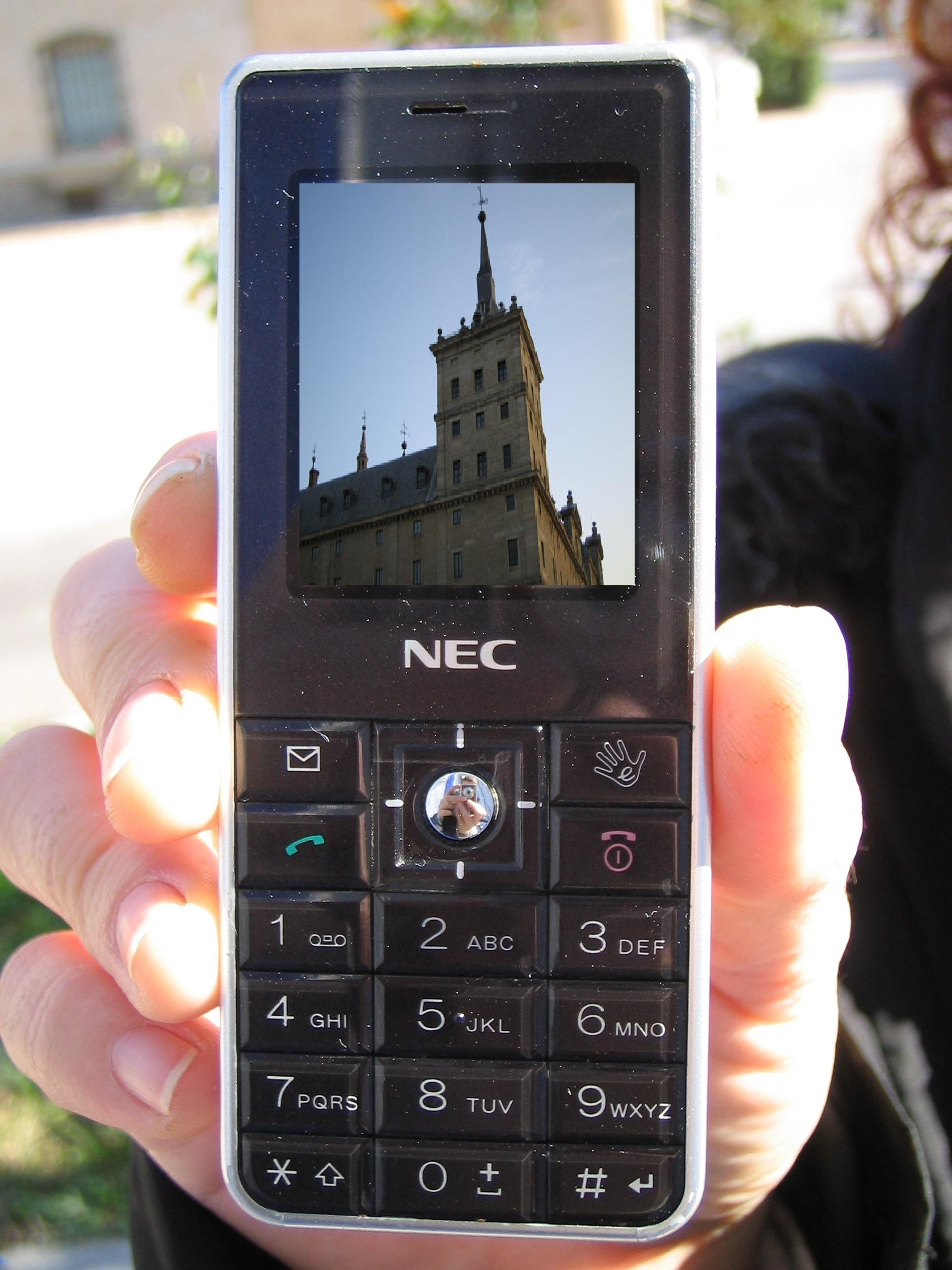 NEC n343i in Spain